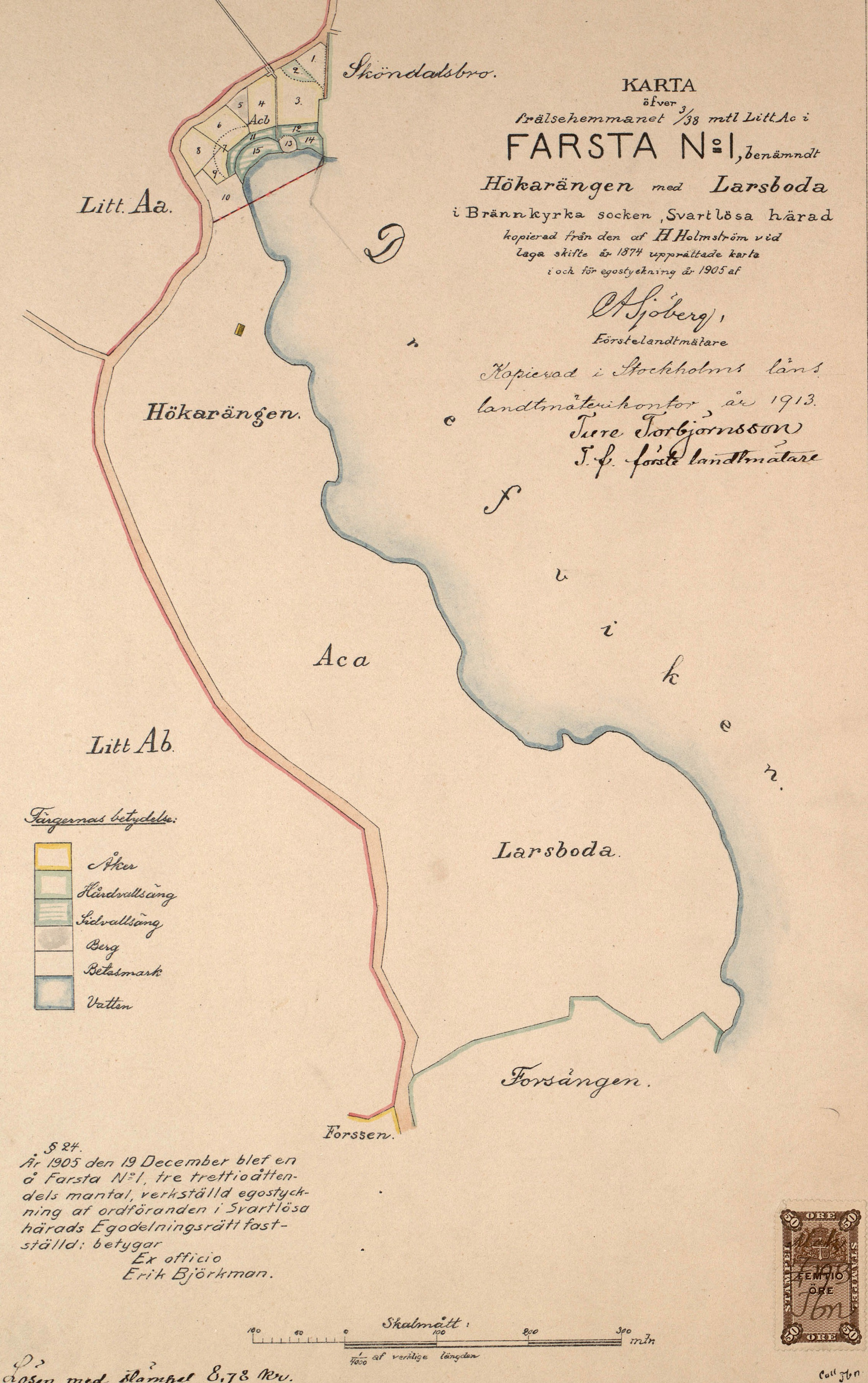 Karta över Farsta nr 1, Hökarängen med Larsboda